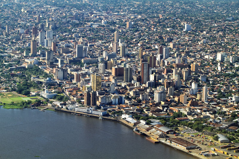 Vista aerea de Asunción